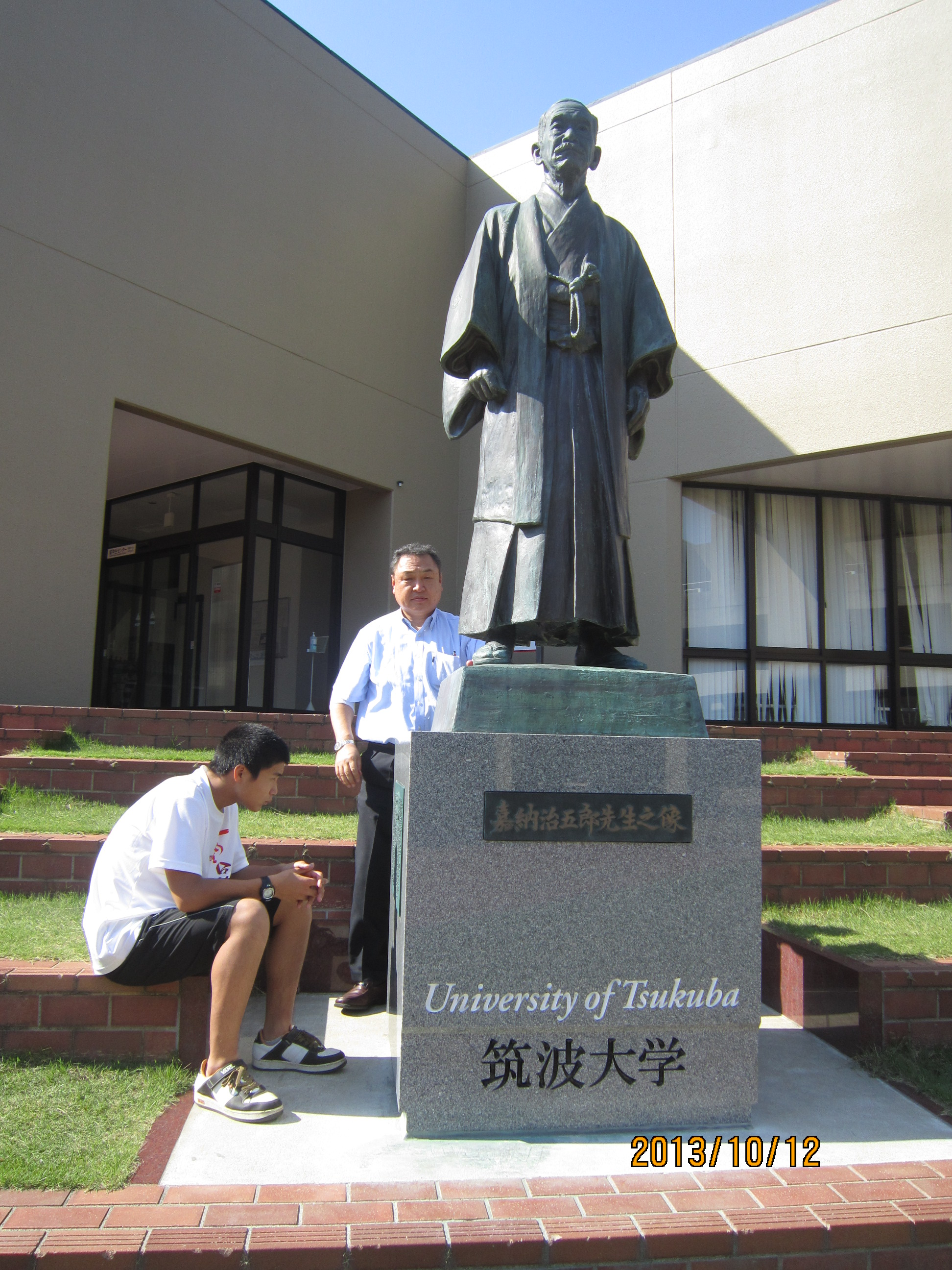 筑波大学構内に建立された嘉納治五郎像（複製）